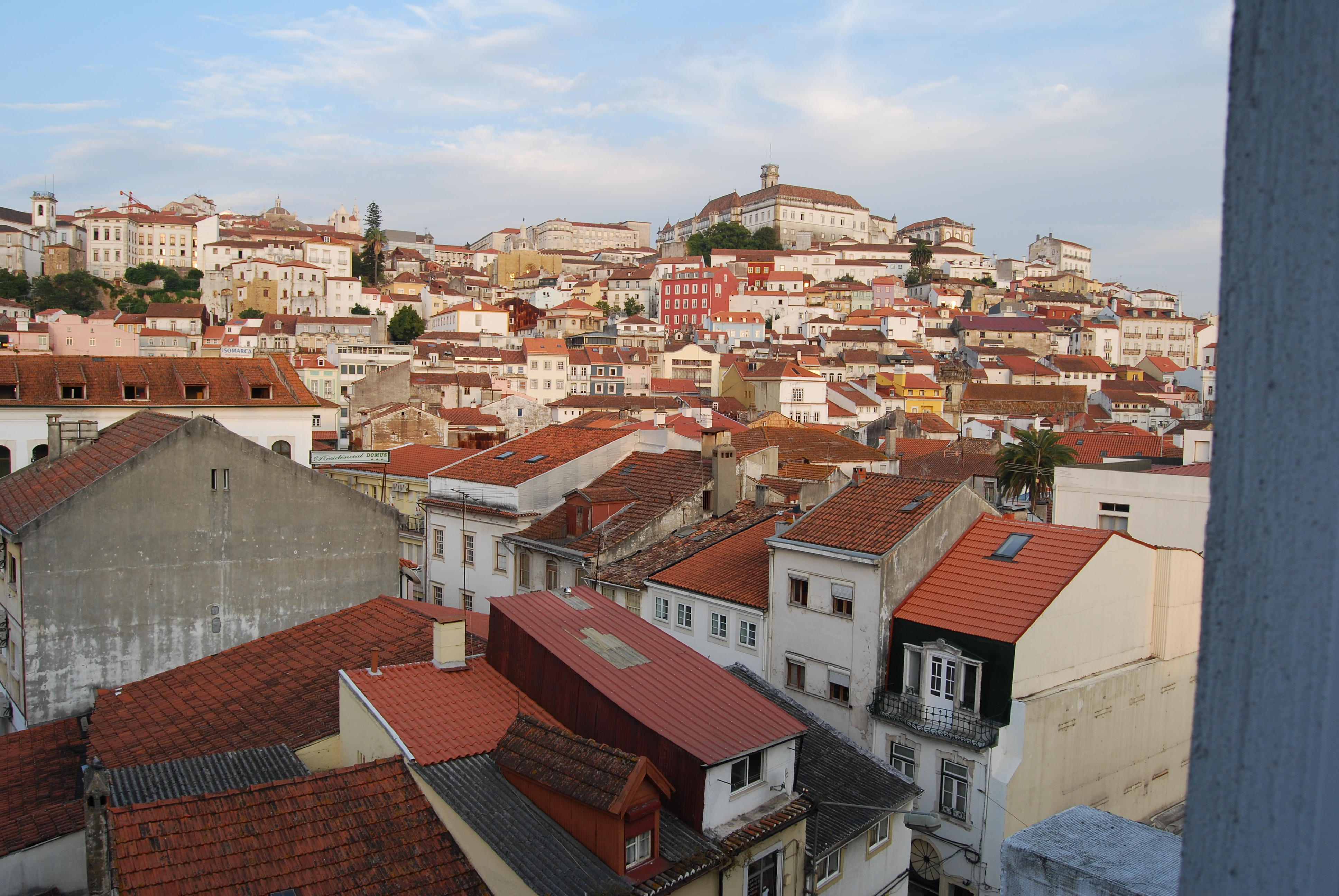 Coimbra, Portugal.